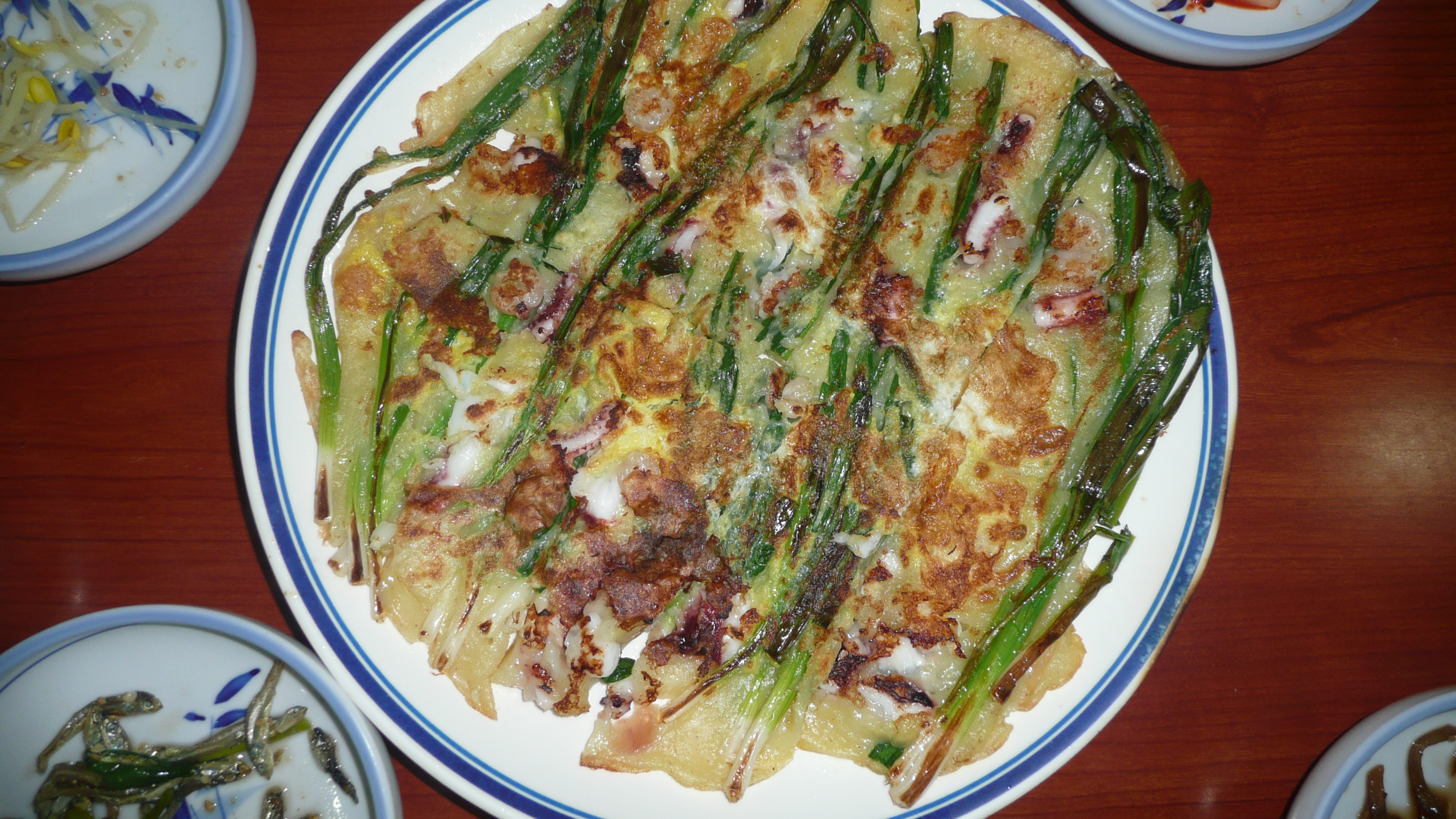 Pajeon - Pfannkuchen mit Meeresfrüchten und Lauch